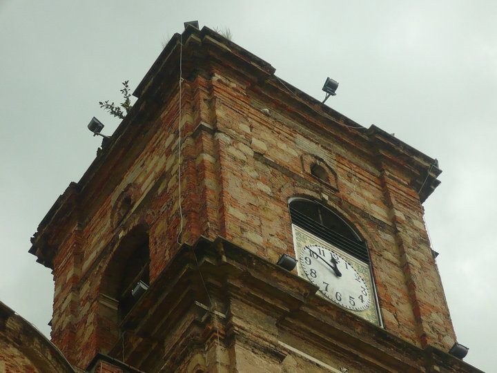 cupula de la catedral diosesana de zipaquira